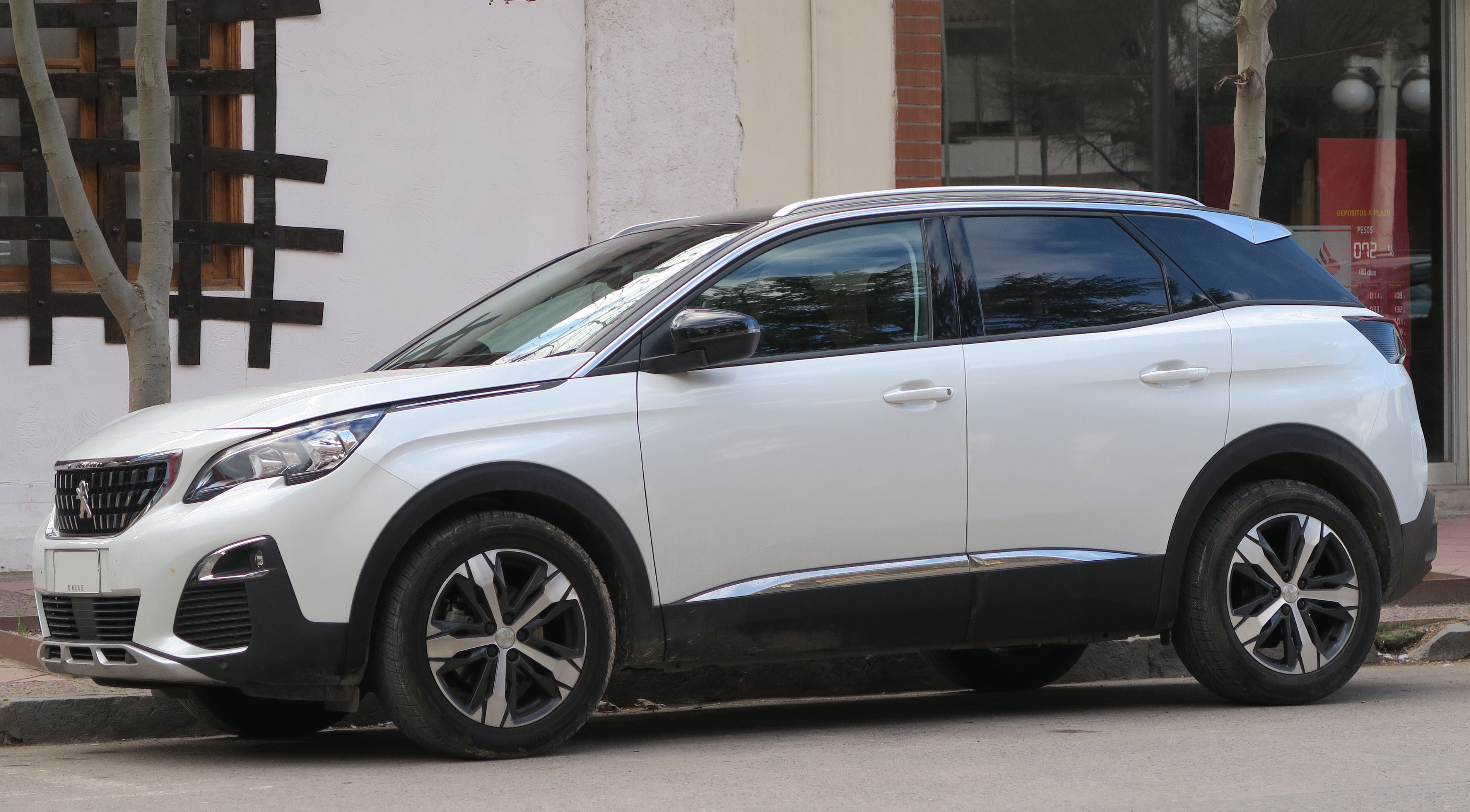 Peugeot 3008 Allure 2017